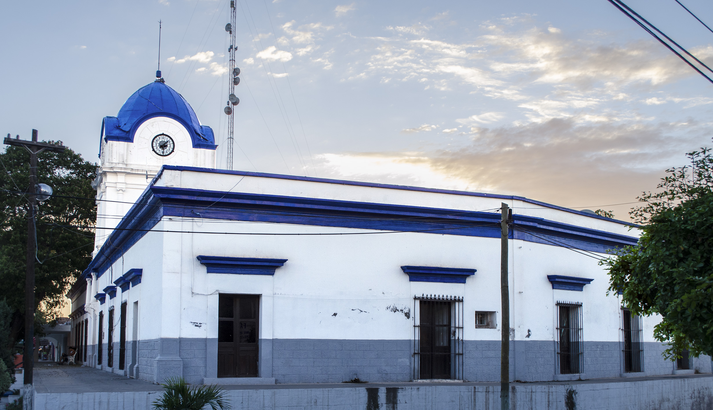 Sindicatura Municipal de Ahome